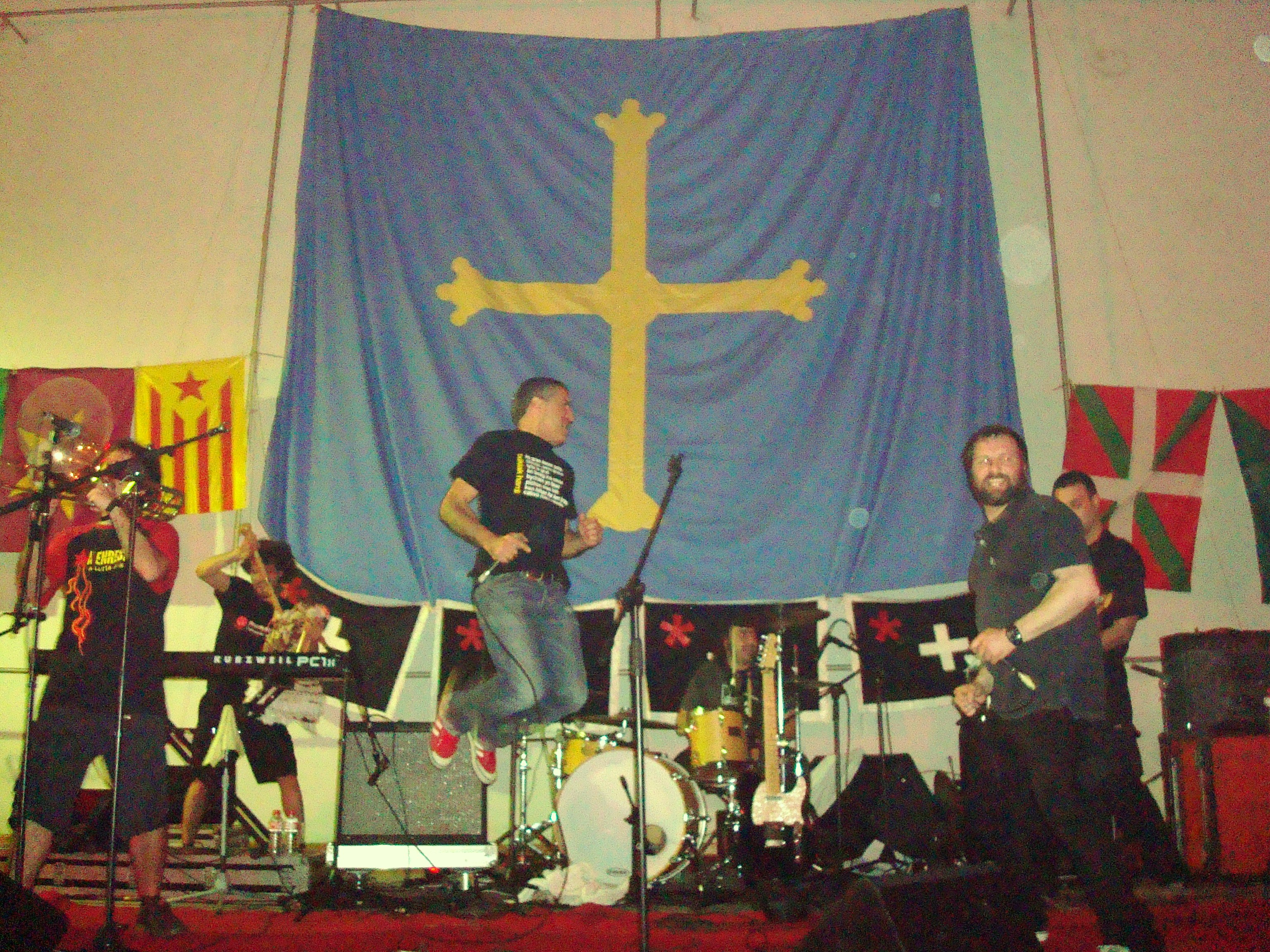 Conciertu 25 mayu 2010 Mallacán&Xune